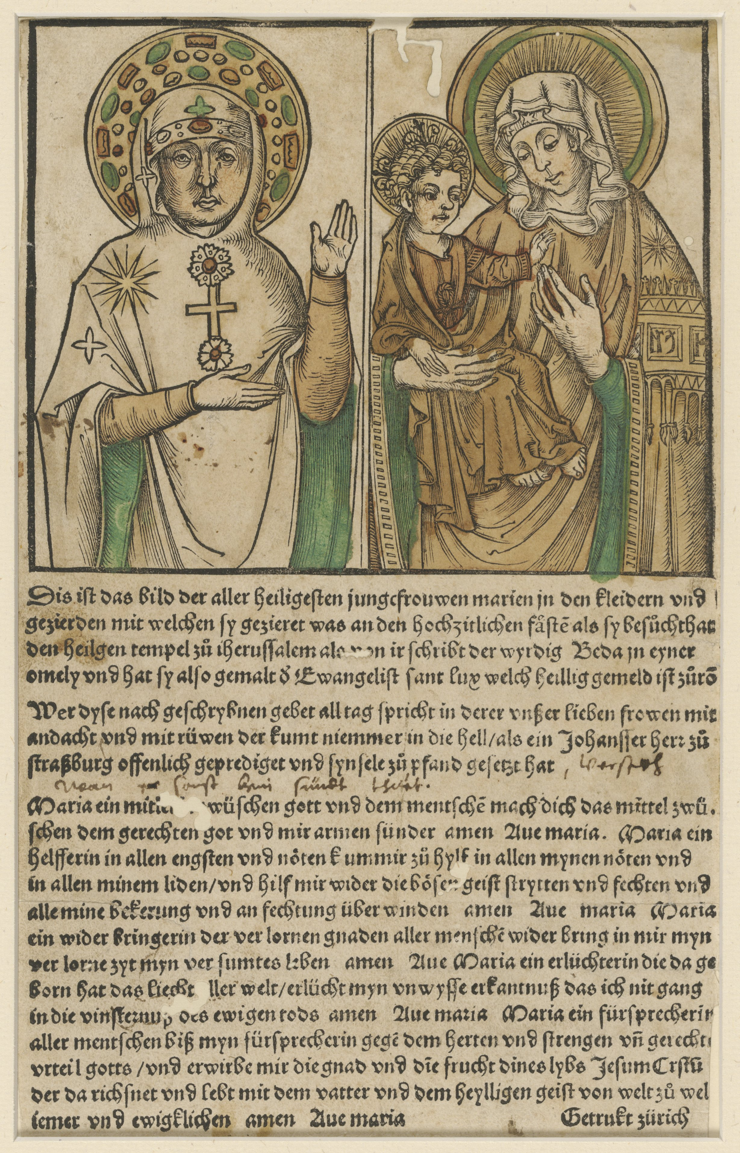 Dis ist das Bild der aller heiligesten Jungcfrouwen Marien in den Kleidern und Gezierden ...